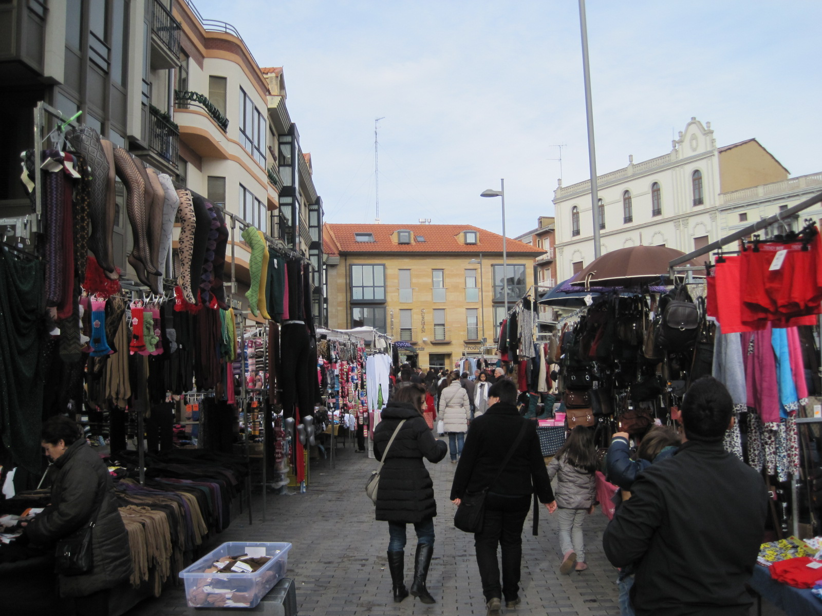 Mercadillo semanal en Astorga (León, España).